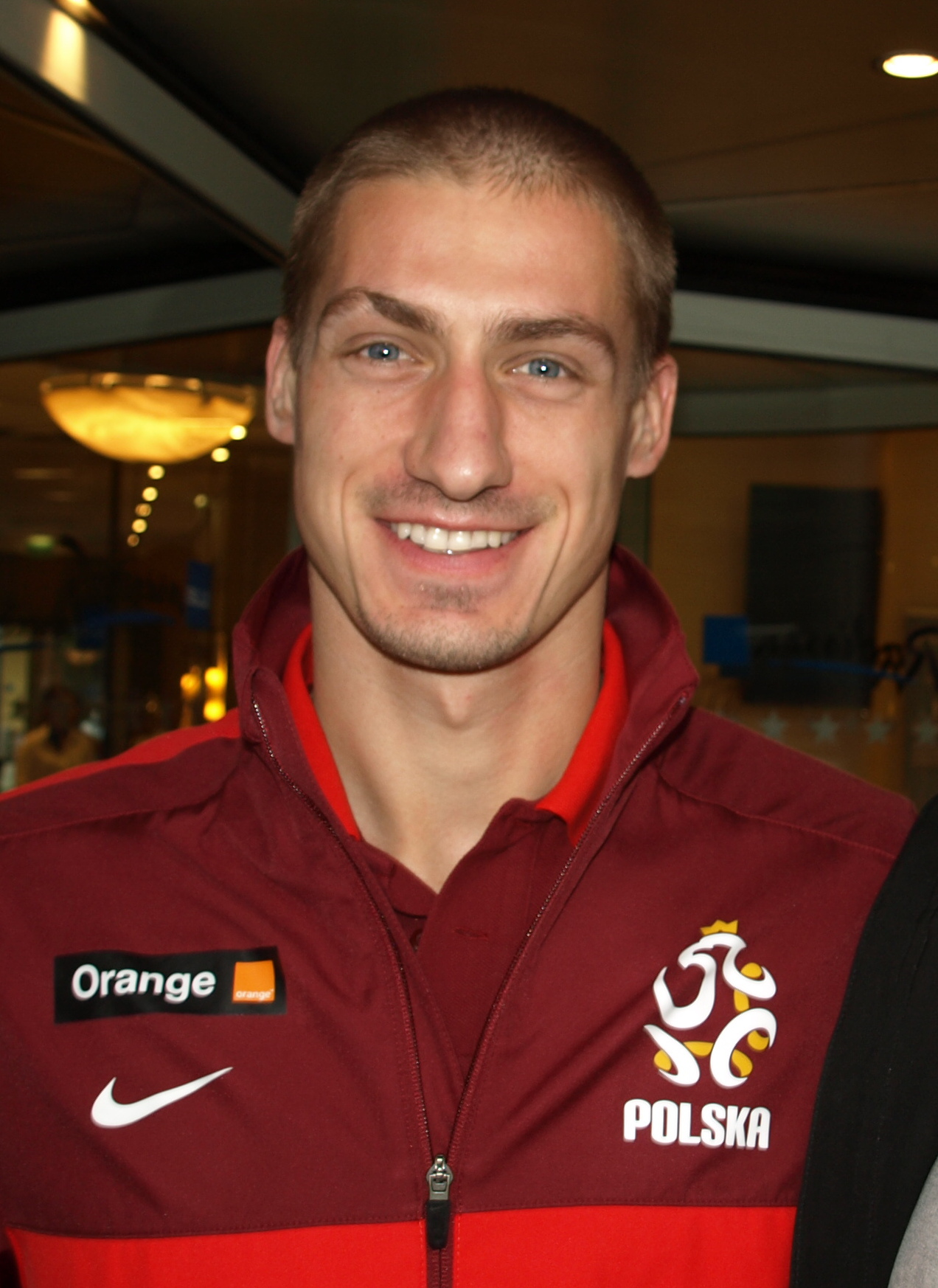 Piotr Celeban